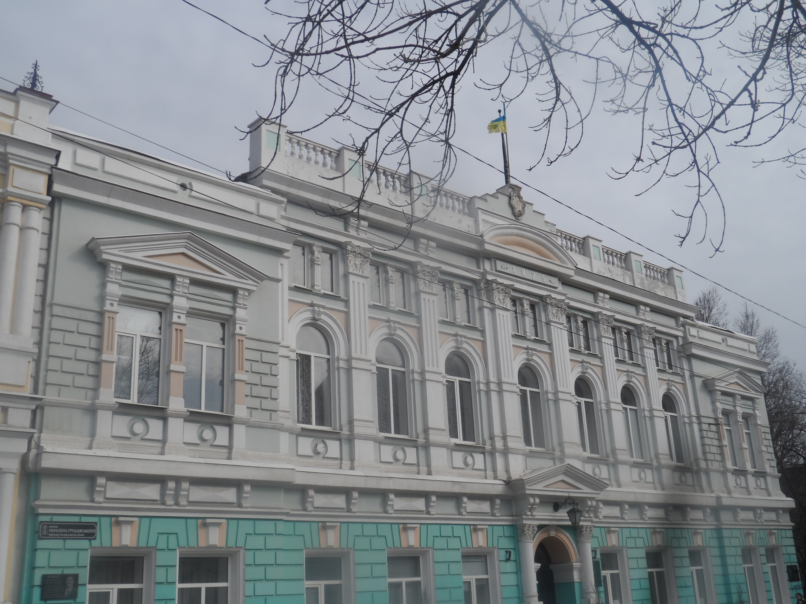 Мелитополь